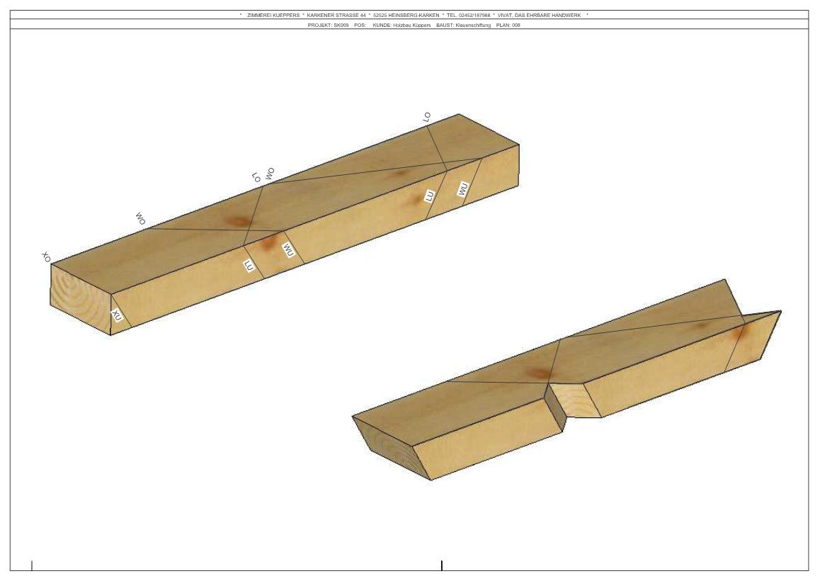 Das Anreißen eines verkanteten Schiftparren